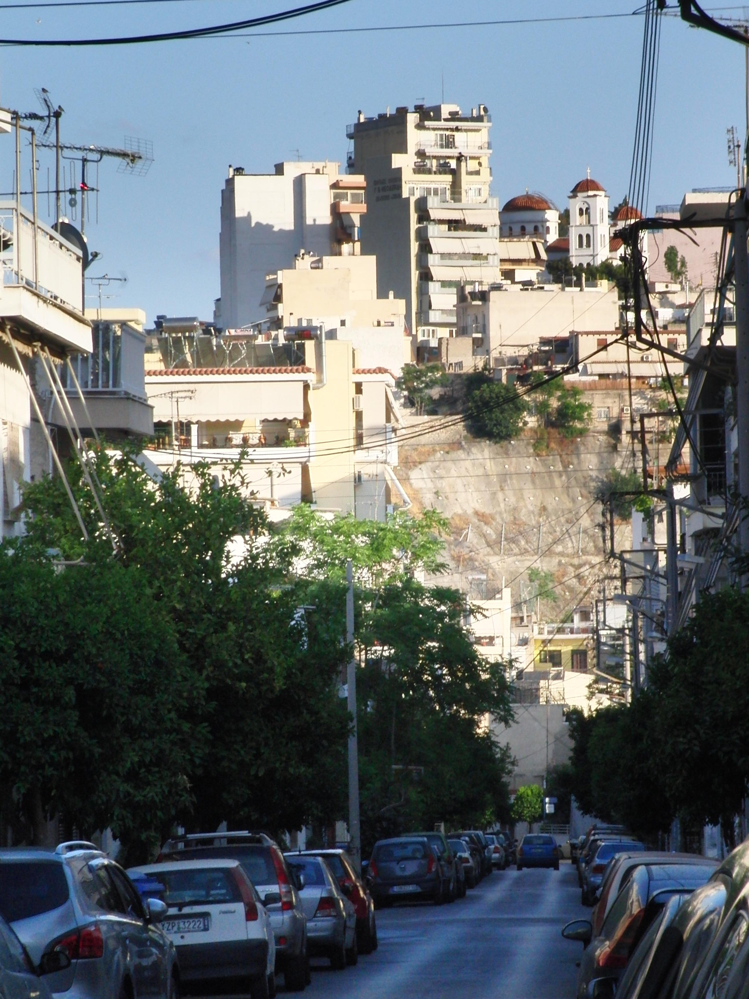 Άποψη της Νίκαιας από την οδό Πέτρου Ράλλη